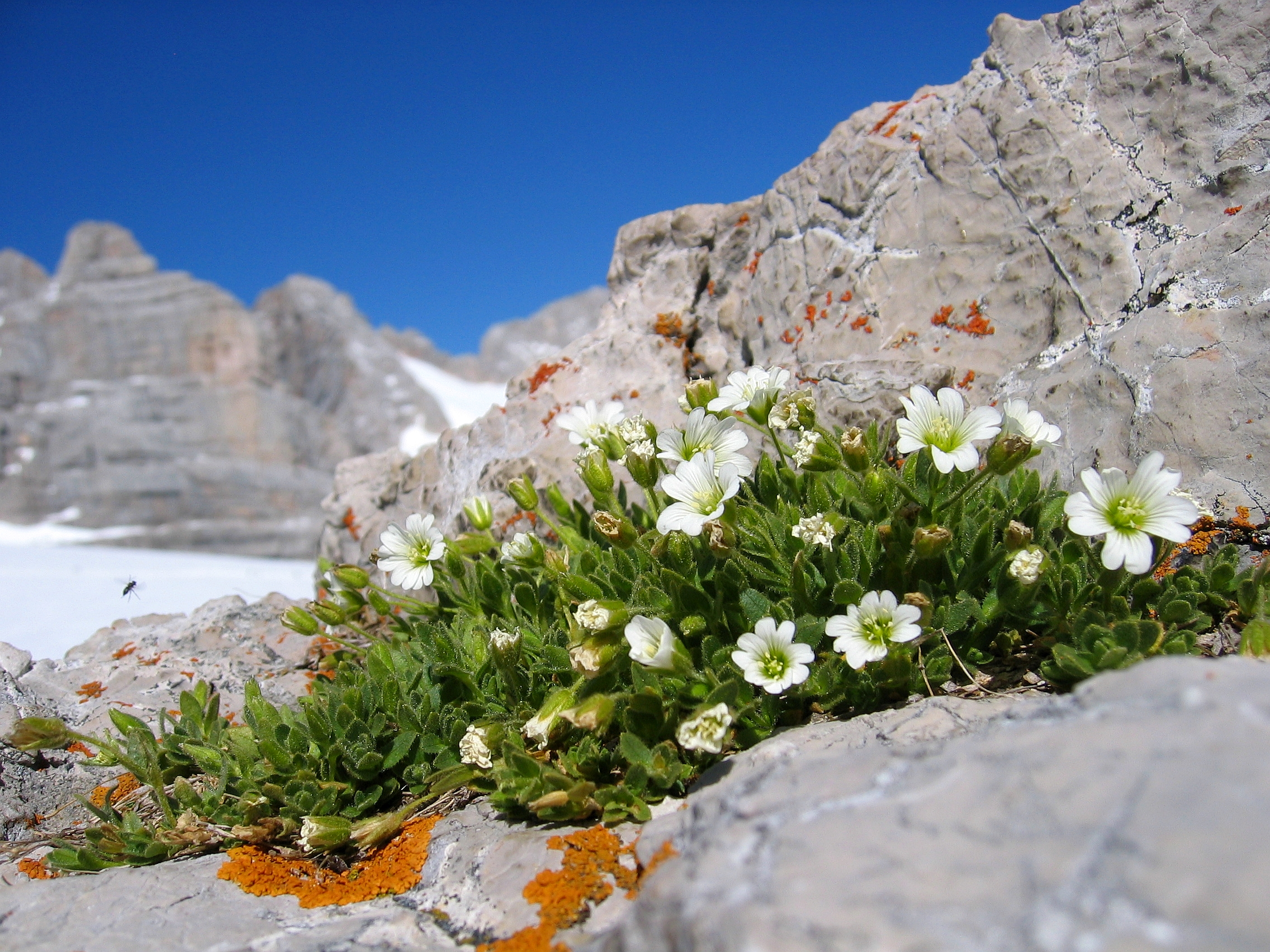 Einblüten-Hornkraut (Cerastium uniflorum), Kleiner Gjaidstein, Dachsteinmassiv, Österreich